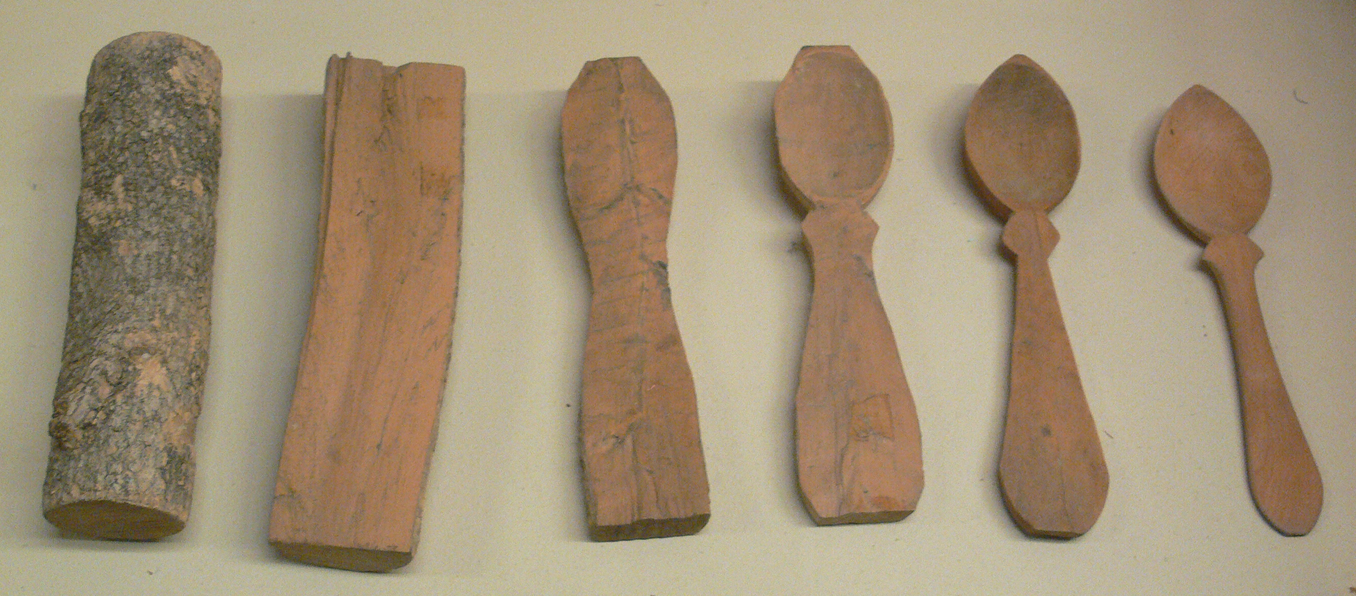 Euskal Museoa / Museo Vasco, Bilbao